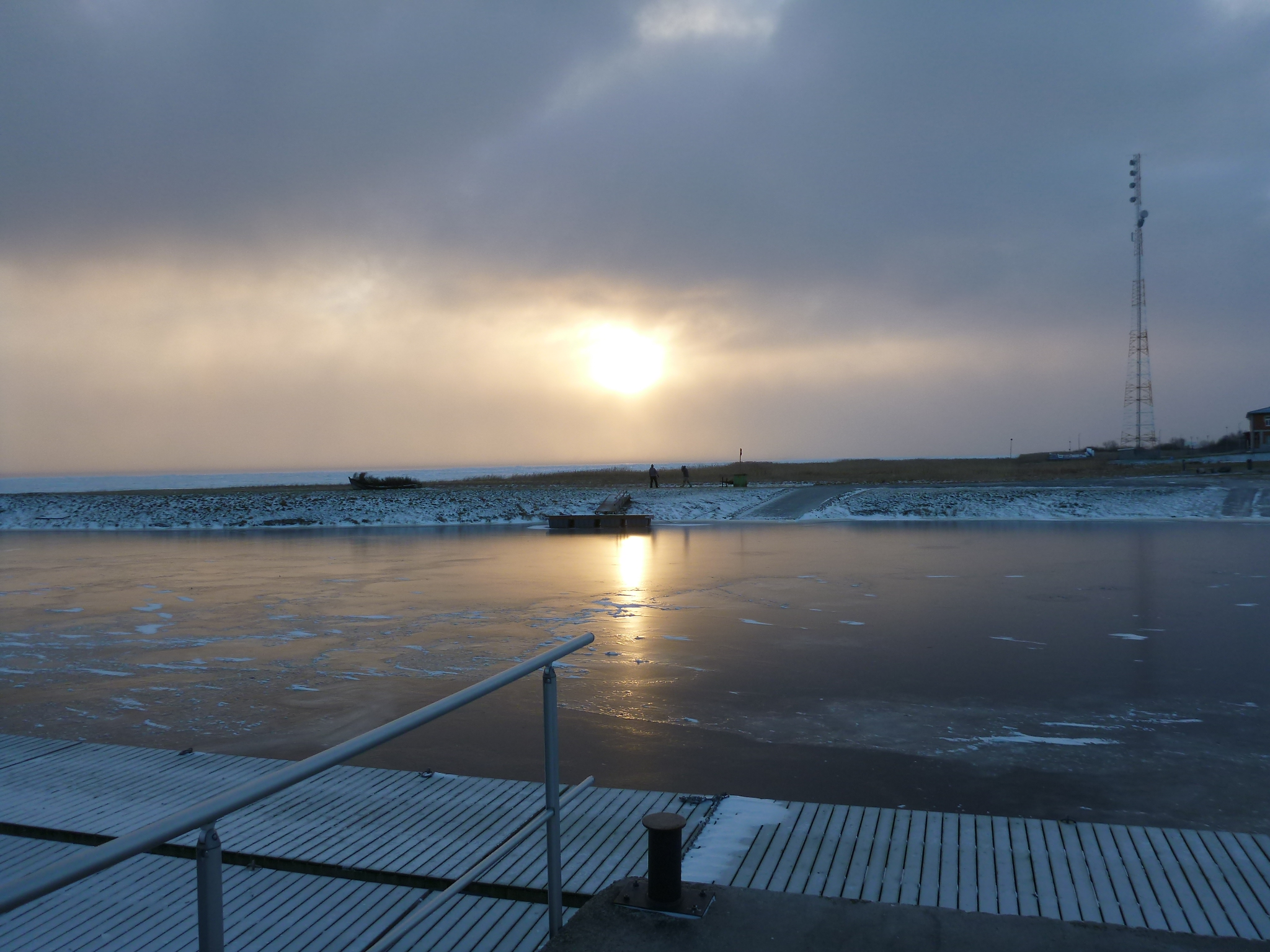 Mustveen satamaa